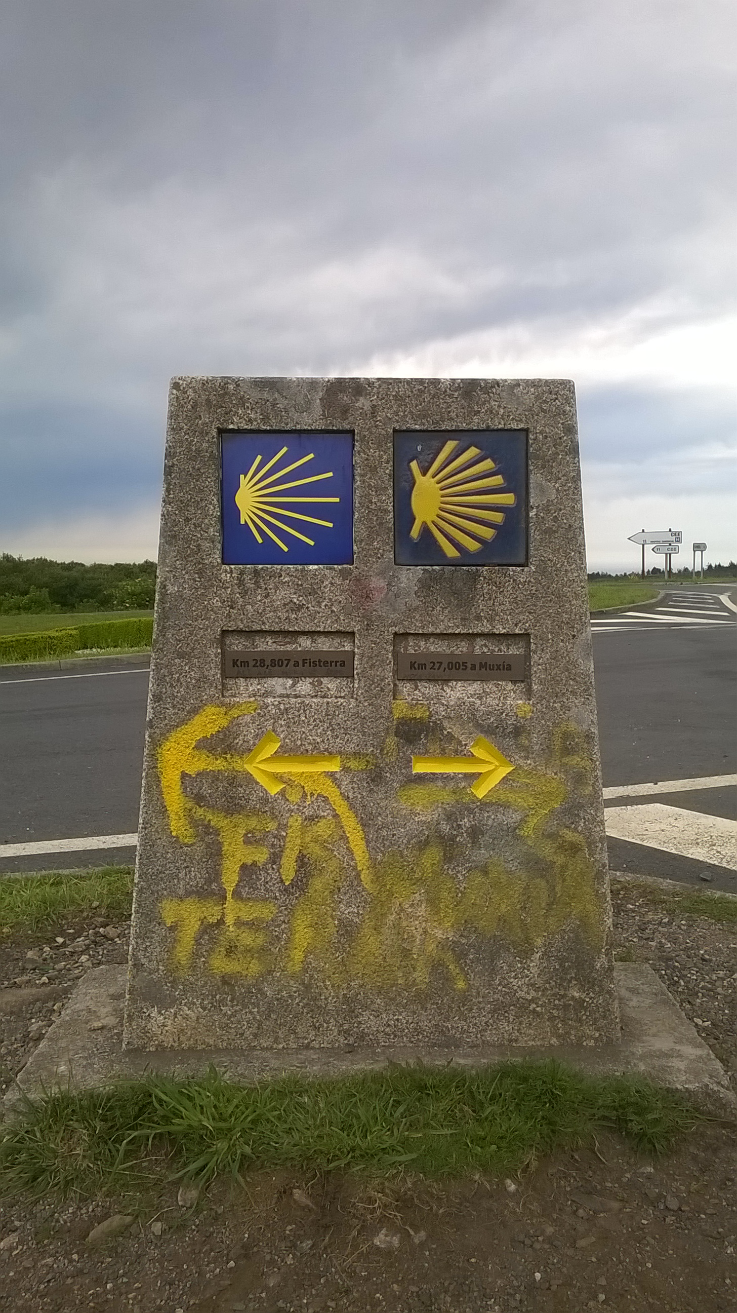 Sinal do Camiño de Fisterra, ó pouco de pasar Hospital (en Dumbría), onde se bifurca o Camiño cara Fisterra, á esquerda, e cara Muxía, de fronte